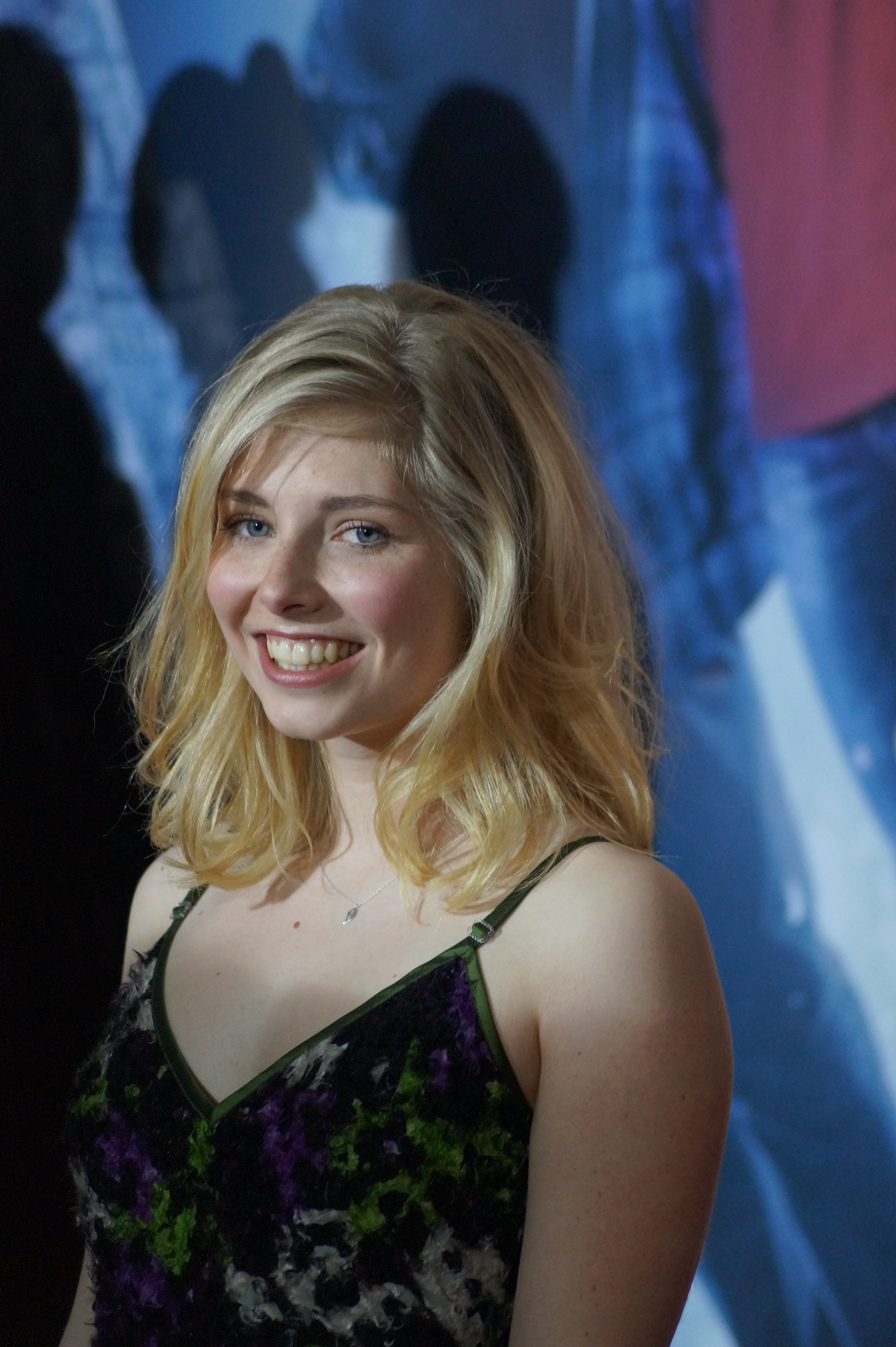 Lilian Prent bei der Deutschlandpremiere von "Mara und der Feuerbringer", am 29. März 2015, im Cinedom Köln